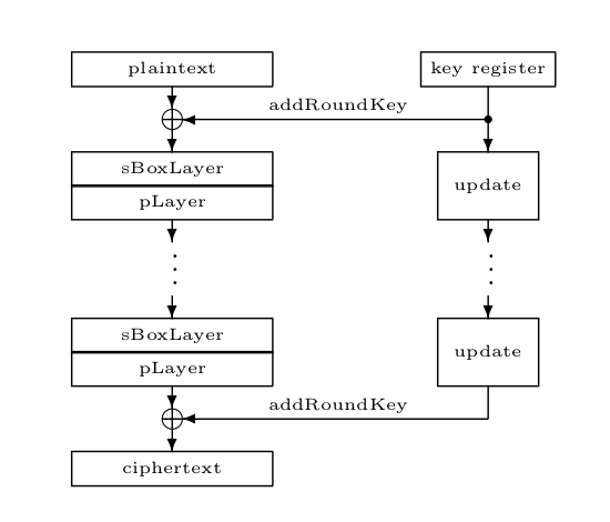 Блок схема работы шифра Present